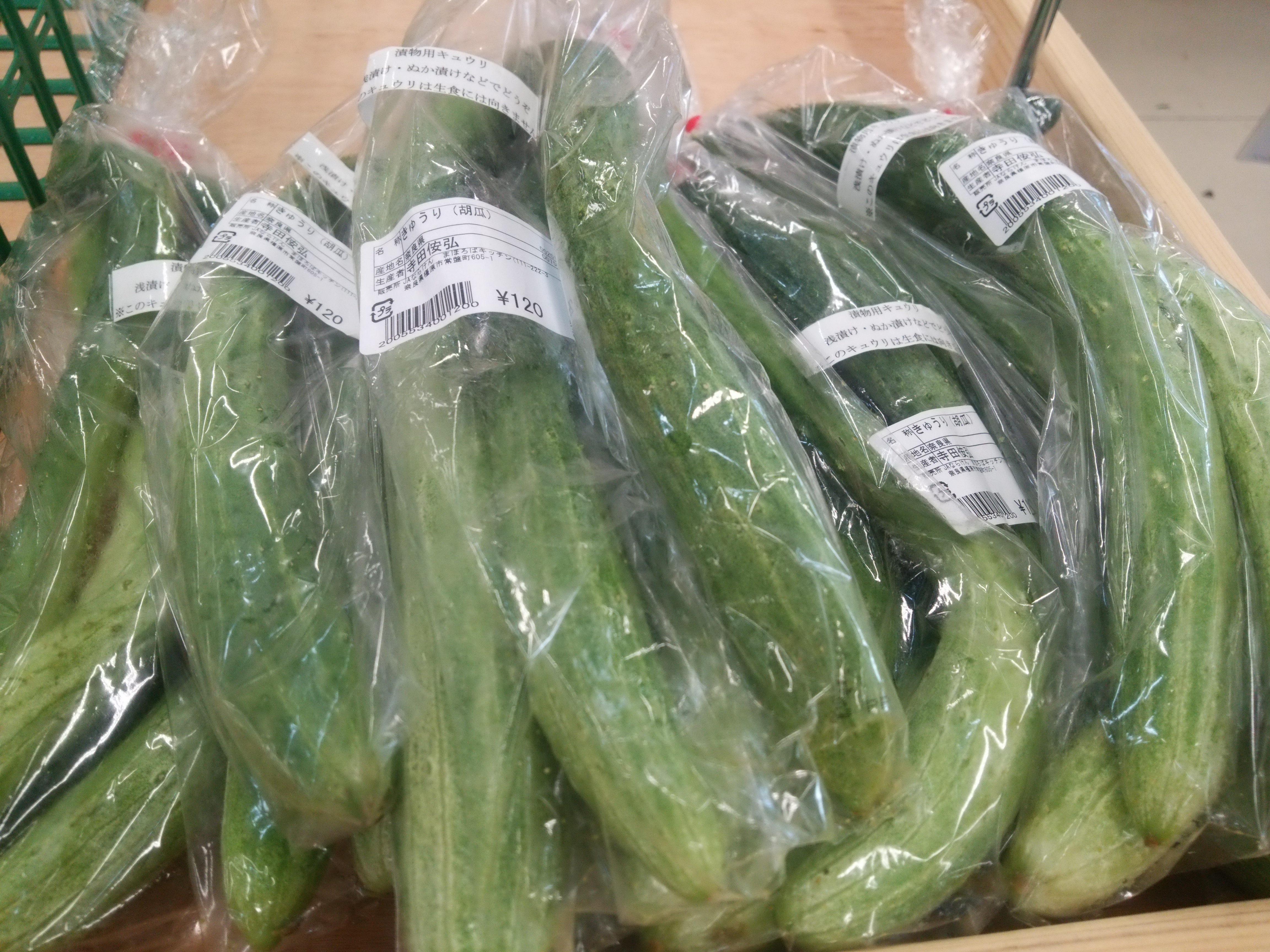 店頭に並ぶ「大和三尺きゅうり」